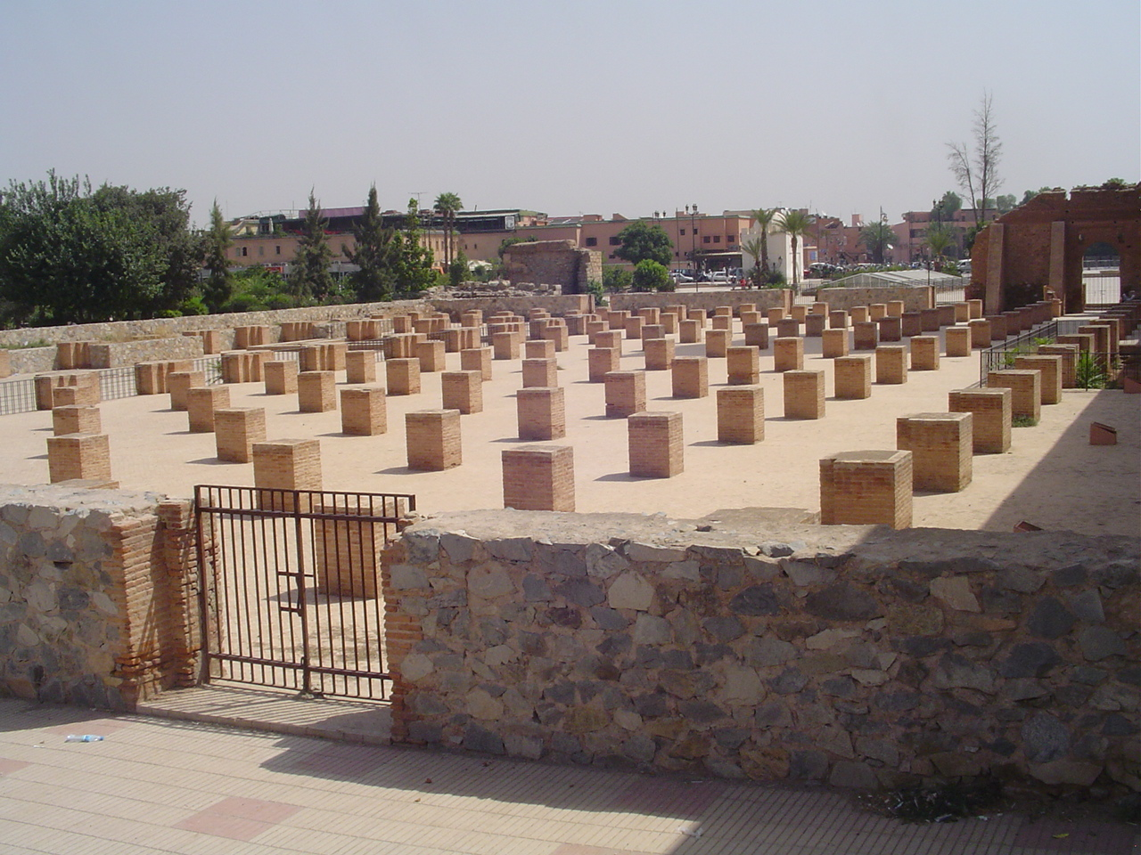 Koutoubia mosque